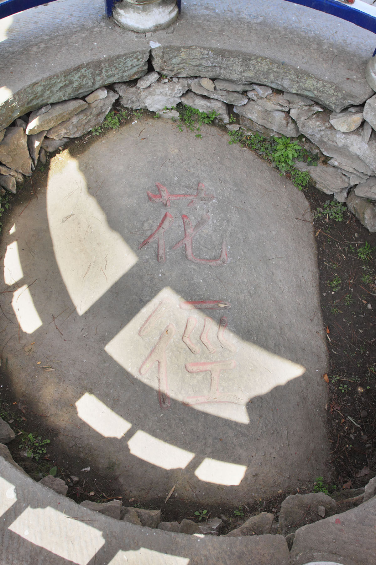 江西庐山花径石刻，九江市文物保护单位